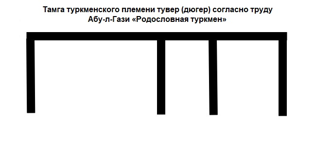 Tamga of the Turkmen Duger tribe as per Abul Ghazi